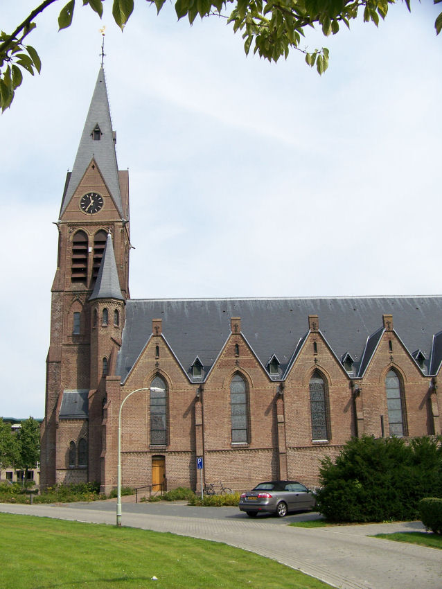 Sint Willibrorduskerk, Sappemeer (NL)